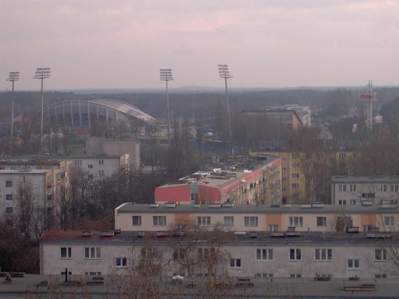 Hala Mistrzów (2007 r.)